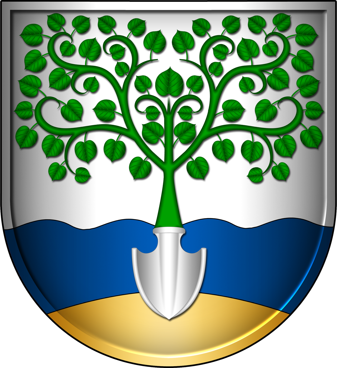 Wappen der Landgemeinde Am Ohmberg